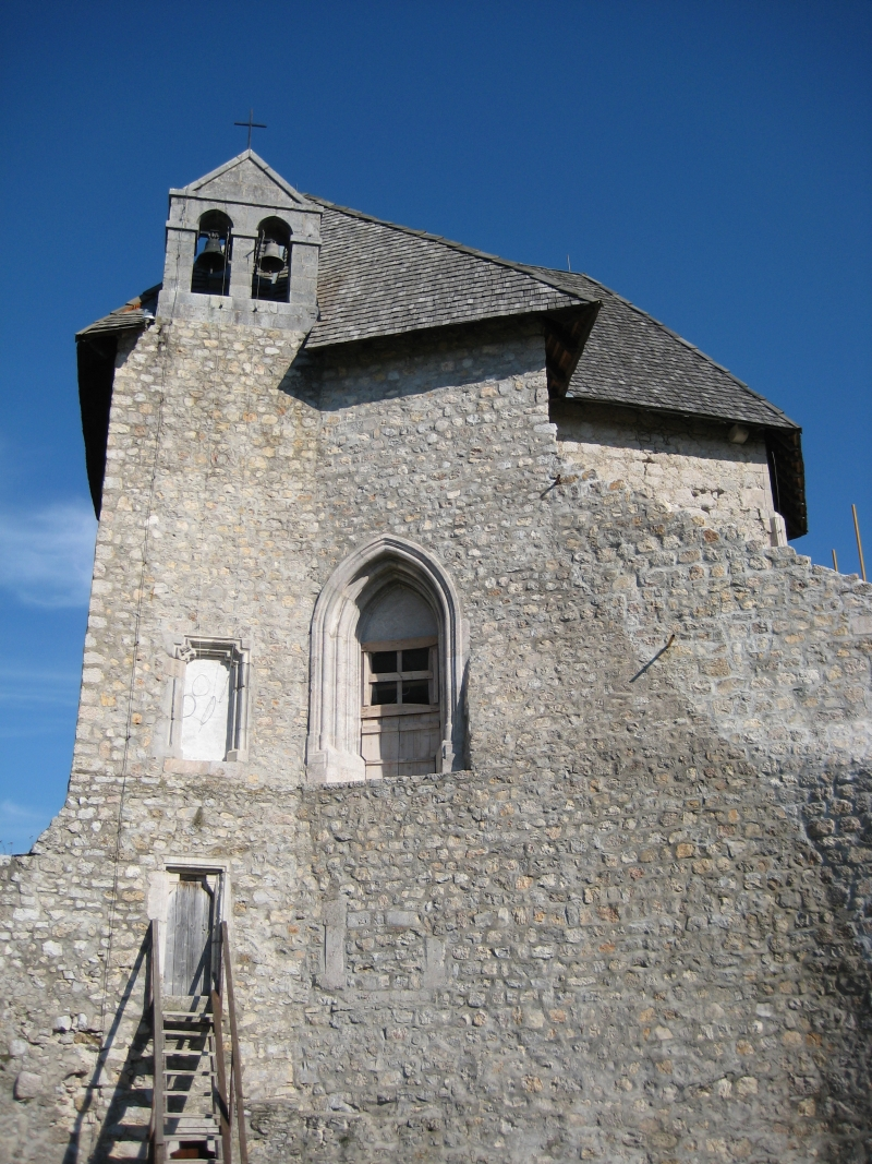 Sokolac, Brinje, Croatia